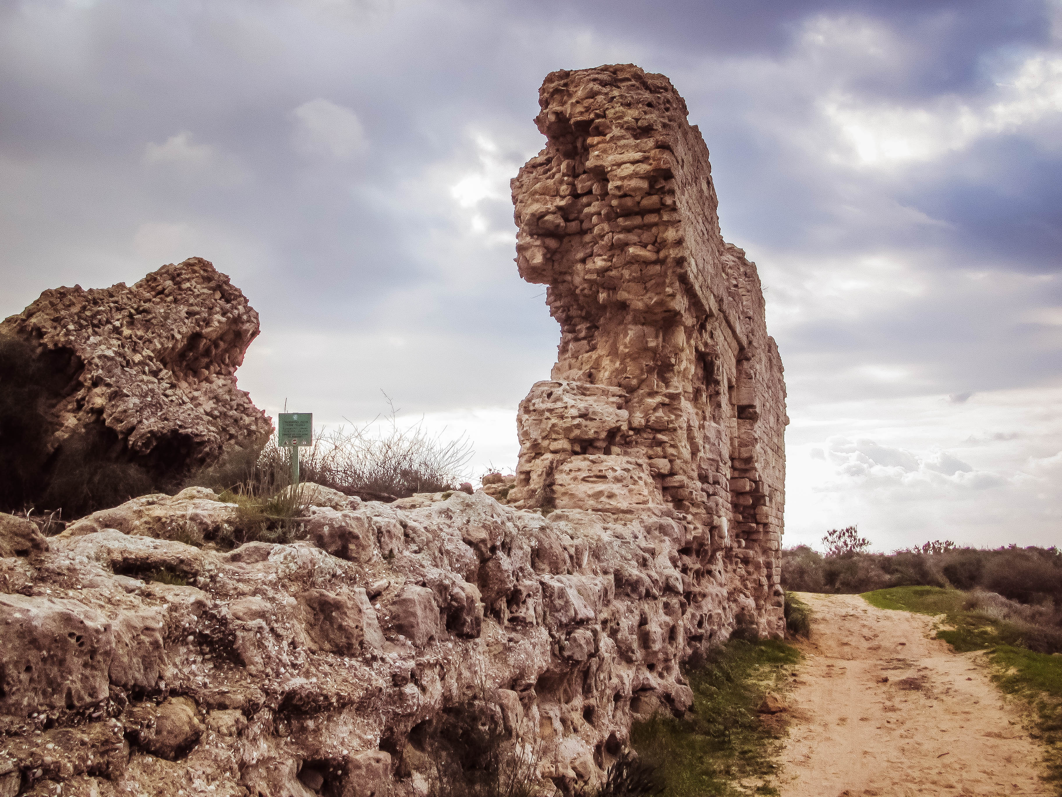 שרידי החומה בגן הלאומי אשקלון